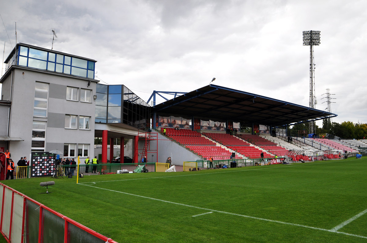 Stary stadion Widzewa Łódź - trybuna A oraz budynek klubowy